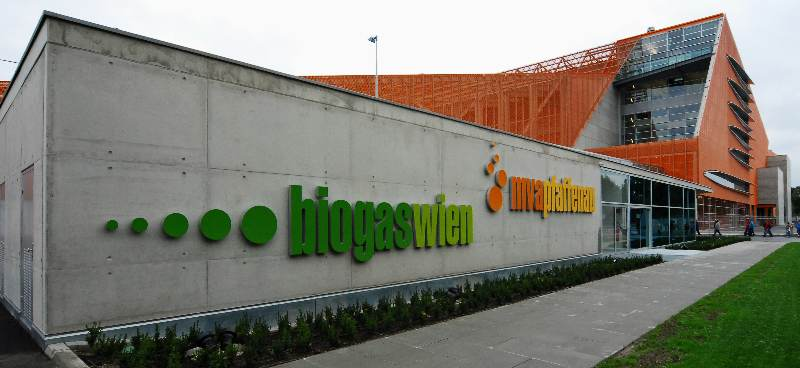 Müllverbrennungsanlage Pfaffenau in Wien-Simmering, eröffnet am 20. September 2008